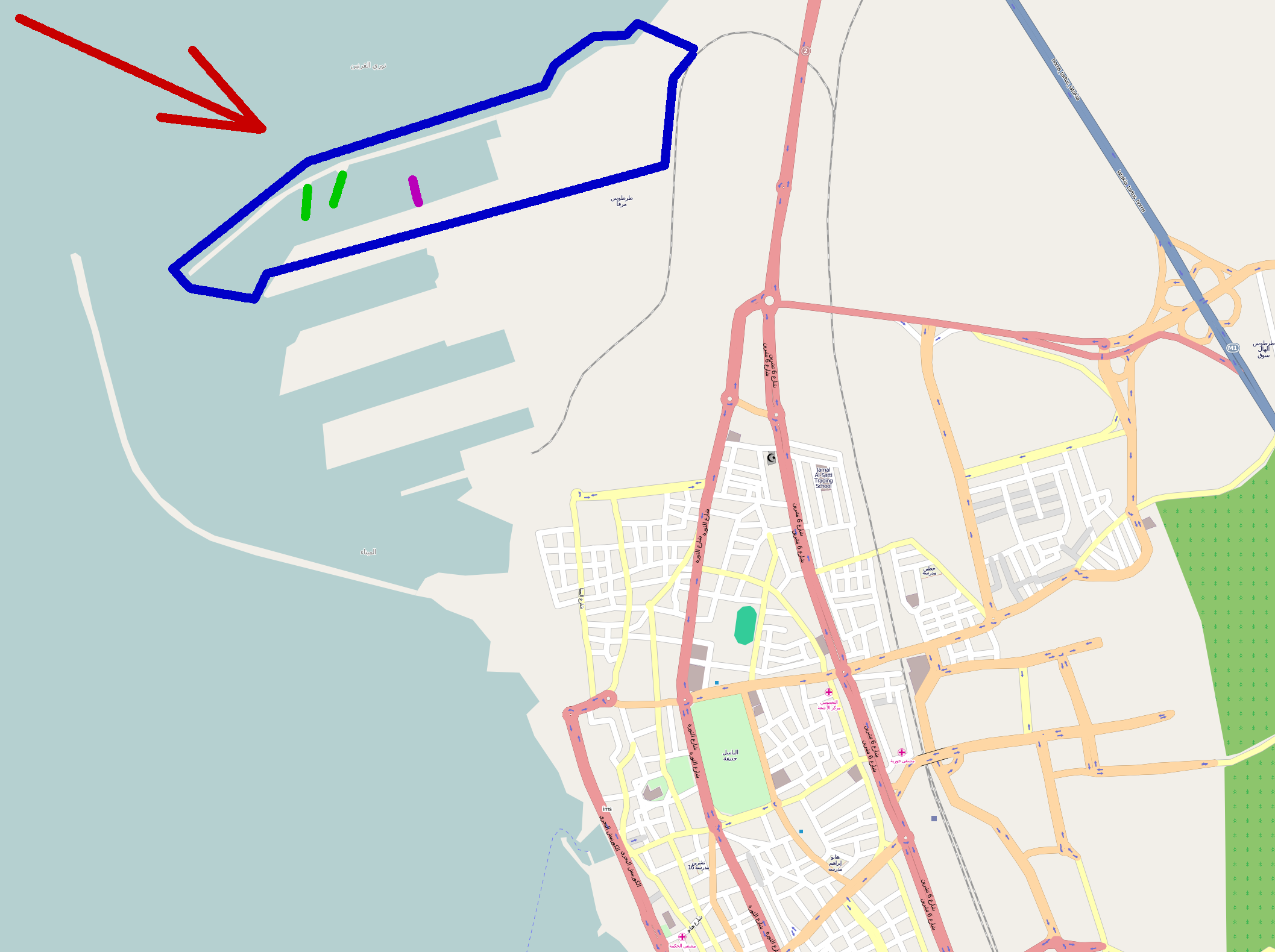 Marinebasis Tartus; von Openstreetmap kopiert, Grenzen der russischen Marinebasis blau umrandet und mit rotem Pfeil markiert. Grün: 2 Schiffsanleger-Pontonbrücken, violett: Beton-Schiffansanleger